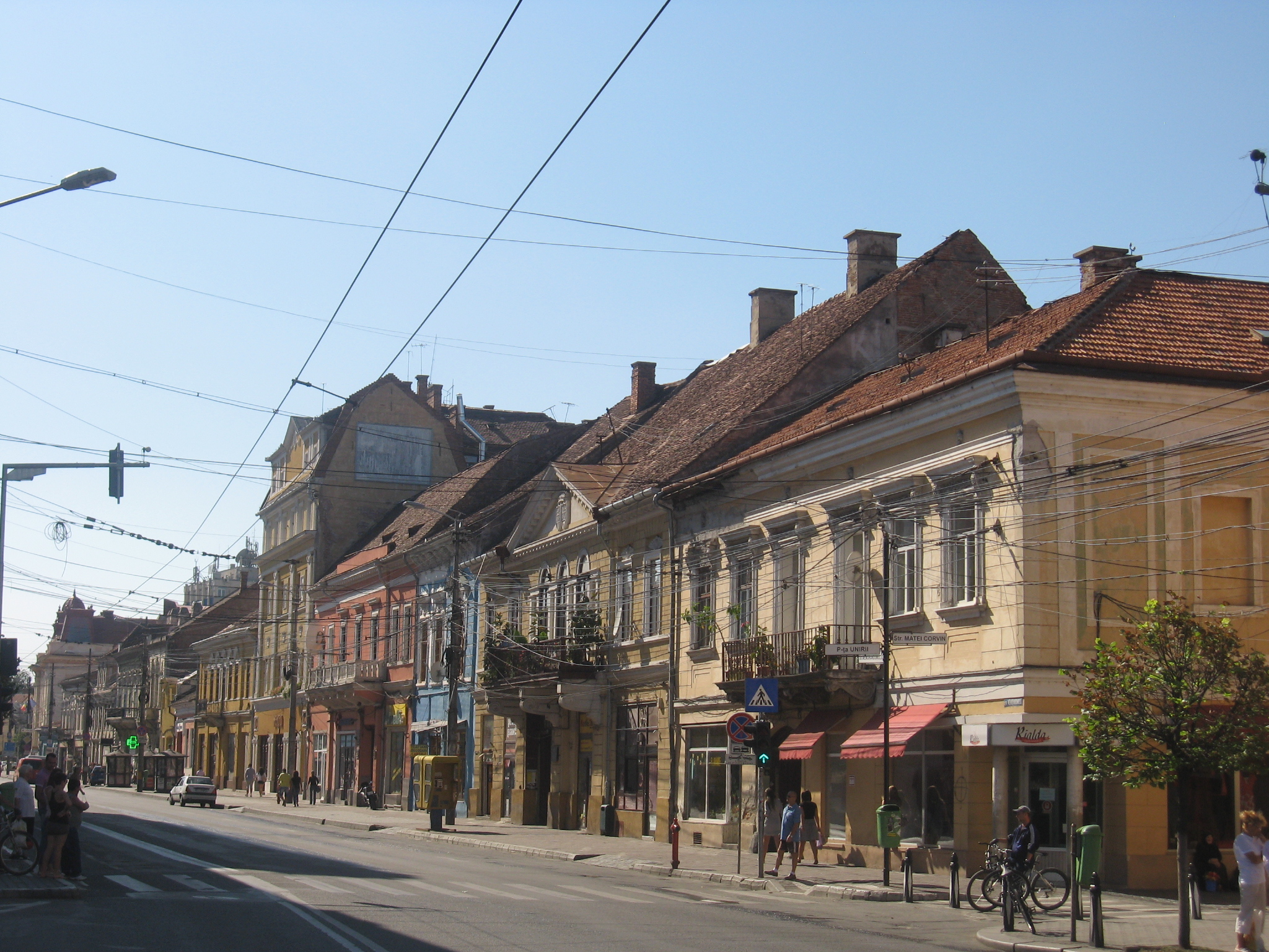 Cluj-Napoca, str.Memorandumului